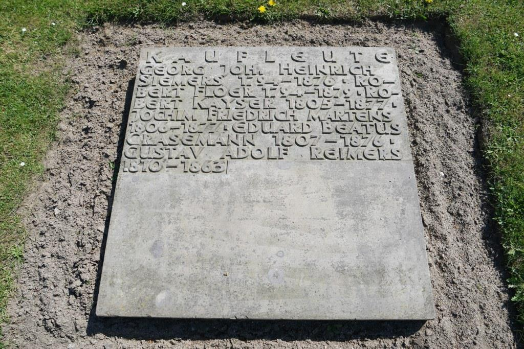 Erinnerung an den Arbeiterführer und Abgeordneten Joachim Friedrich Martens (1806-1877); Sammelgrabmaltafel Althamburgischer Gedächtnisfriedhof auf dem Hamburger Ohlsdorfer Friedhof. Ebenfalls wird unter anderen erinnert an den Hamburger Kaufmann und Politiker Robert Kayser.